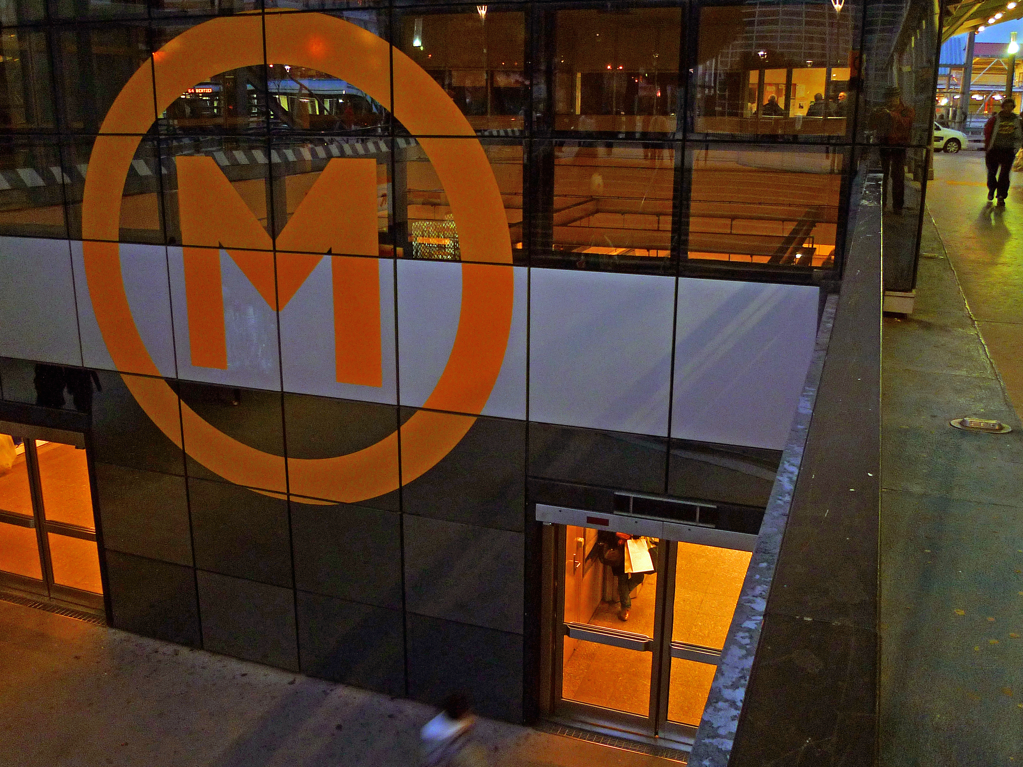 Entrée du métro au forum des Arènes à Toulouse.